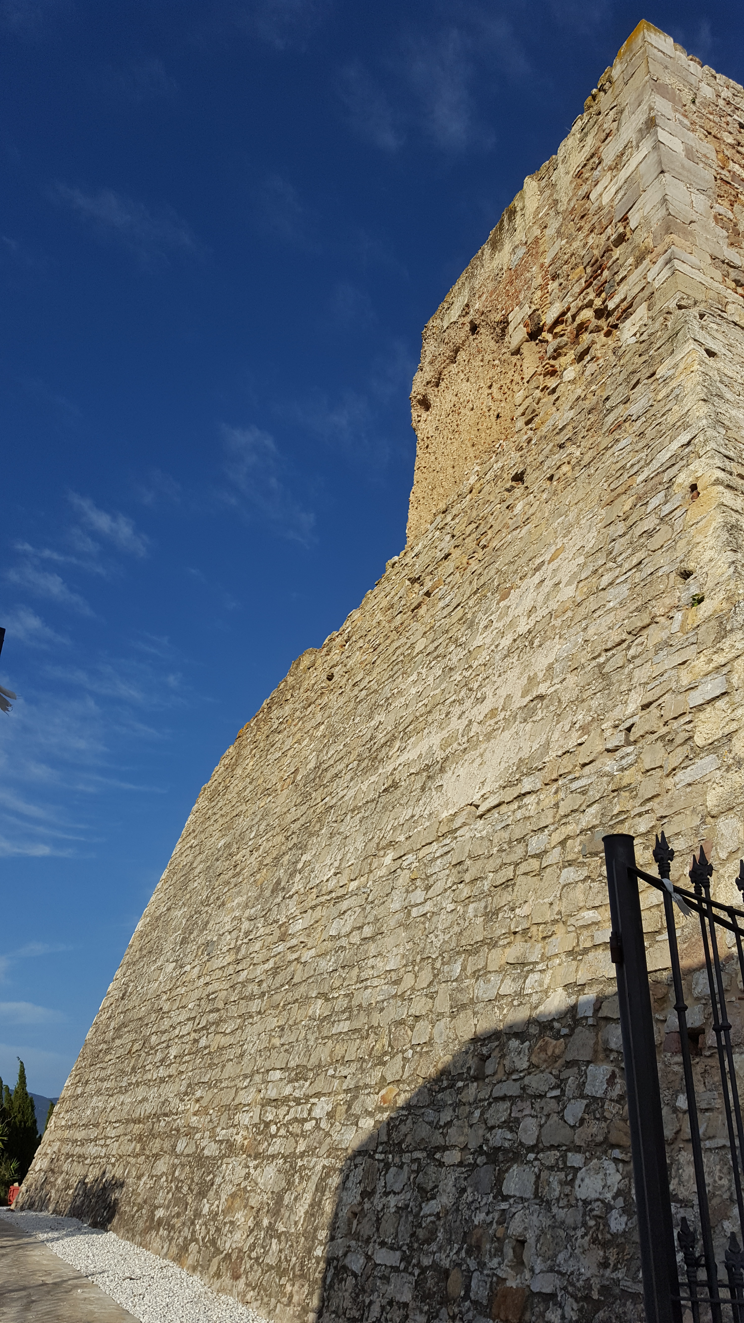 Castillo de Alcalá de los Gazules, Cádiz; España